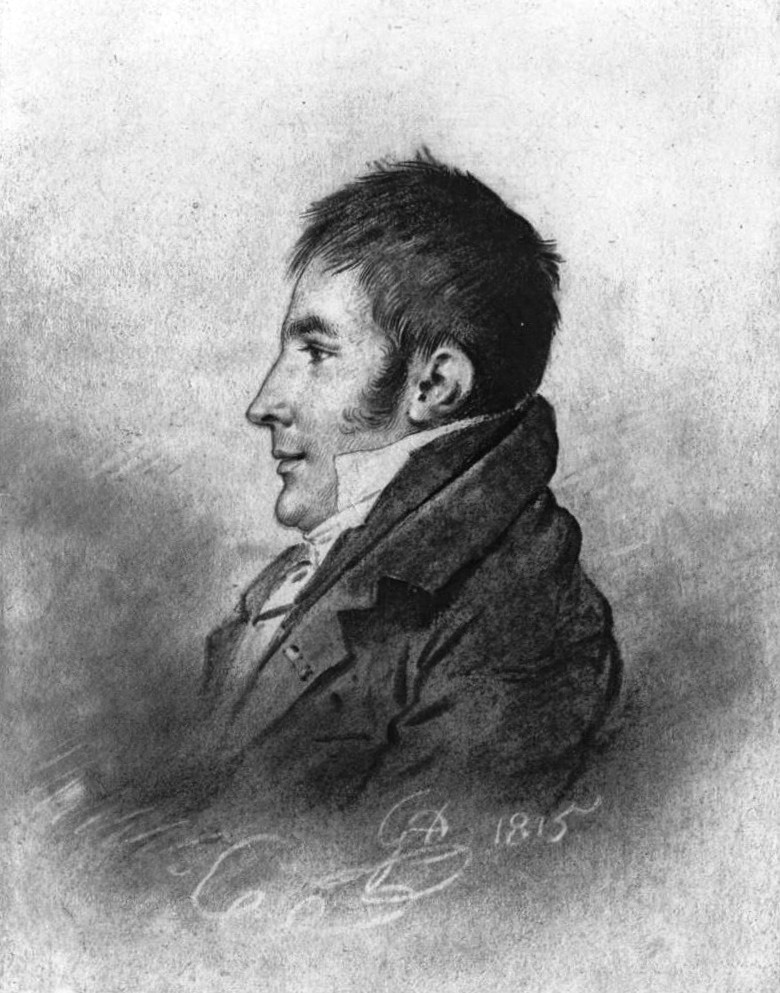 "Bertin de Veaux" (héliographie de P. Dujardin d'après un dessin de Girodet-Trioson appartenant à Mme la comtesse de Rayneval).